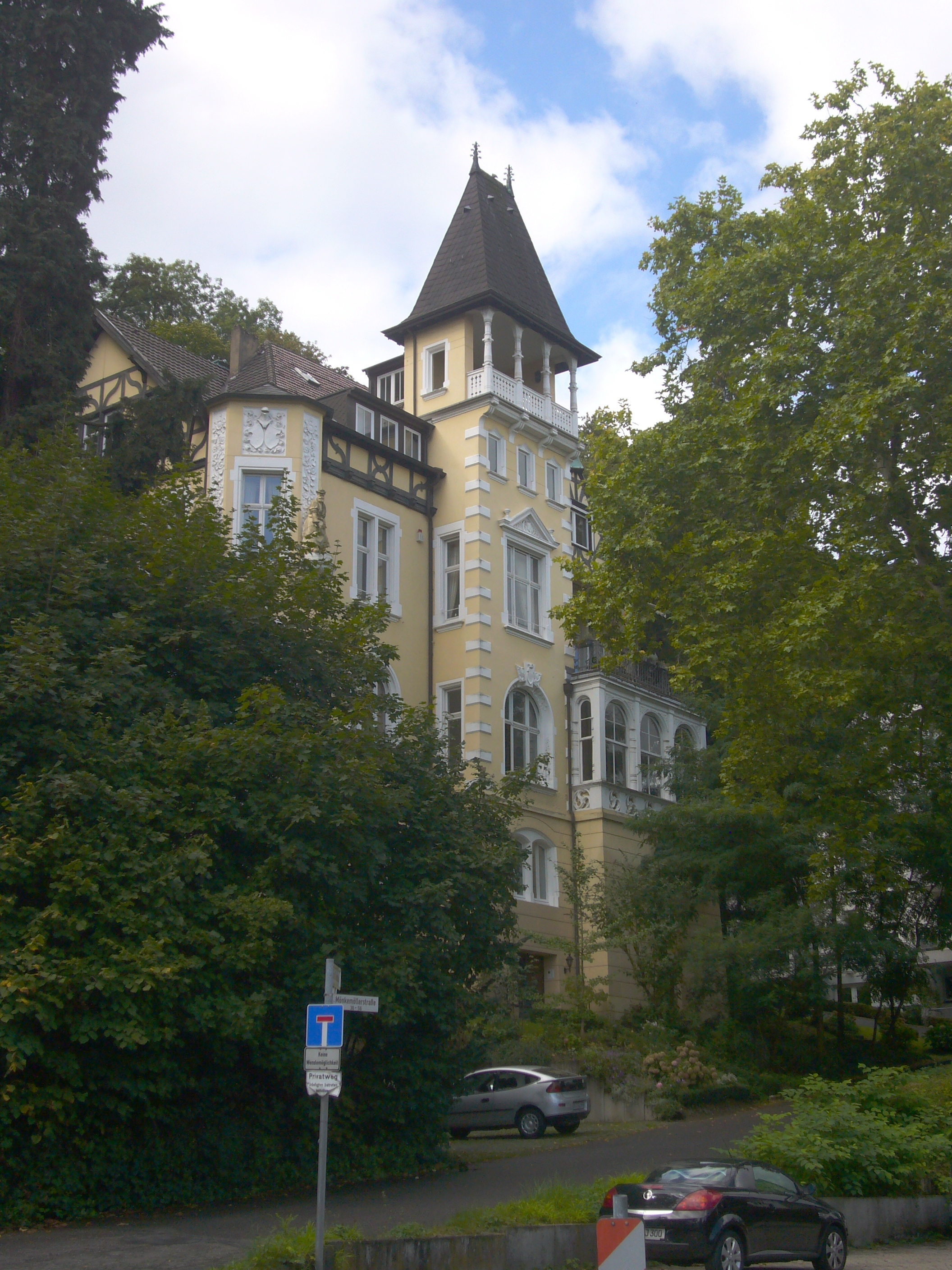 Das Palais Mönkemöller in Dottendorf, Bonn